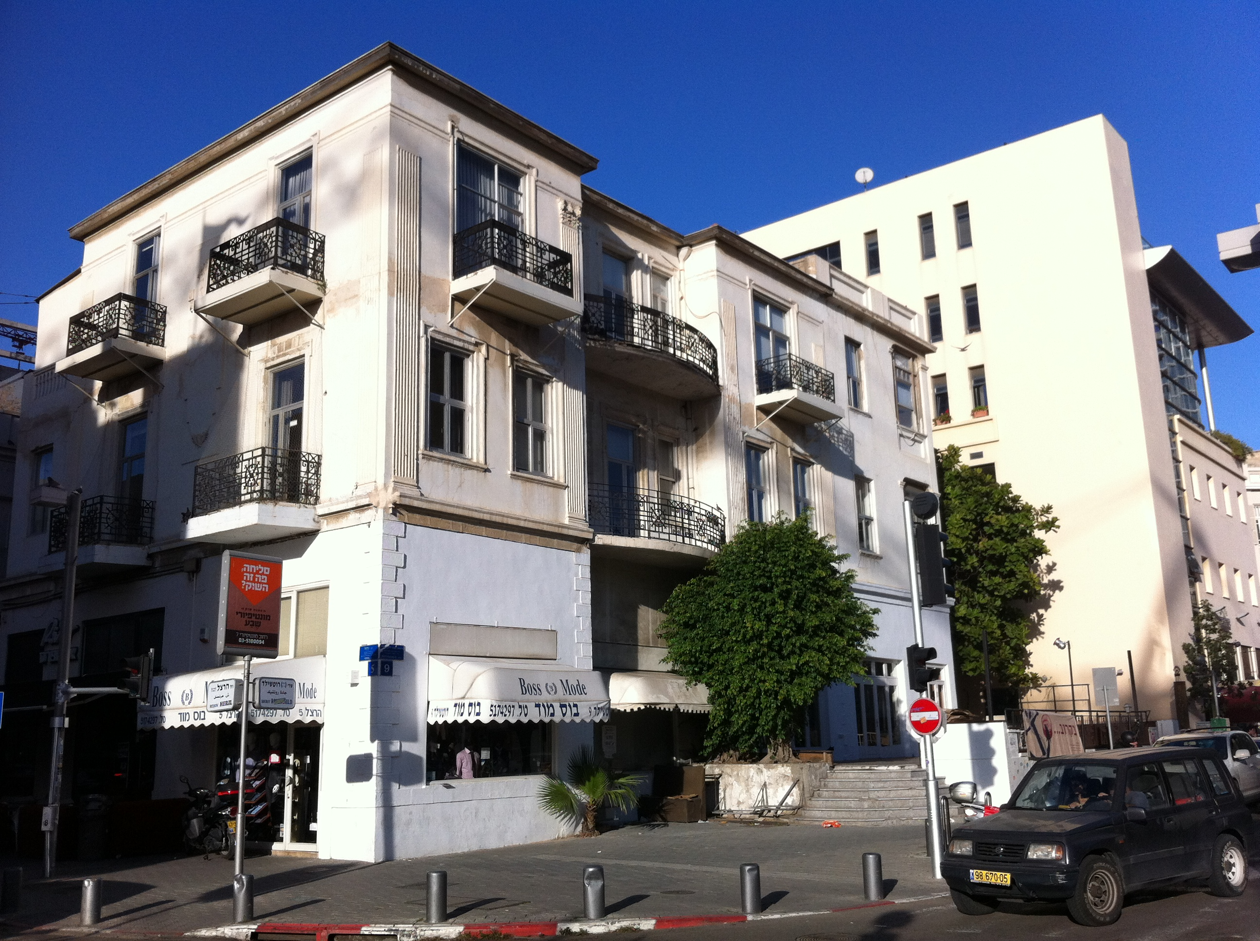 בית יוסף אליהו שלוש הוא אחד משישים הבתים הראשונים של אחוזת בית, השכונה הראשונה של תל אביב. היה הקבלן שבנה מחצית מבתיה הראשונים של אחוזת בית ואת הגימנסיה העברית הרצליה